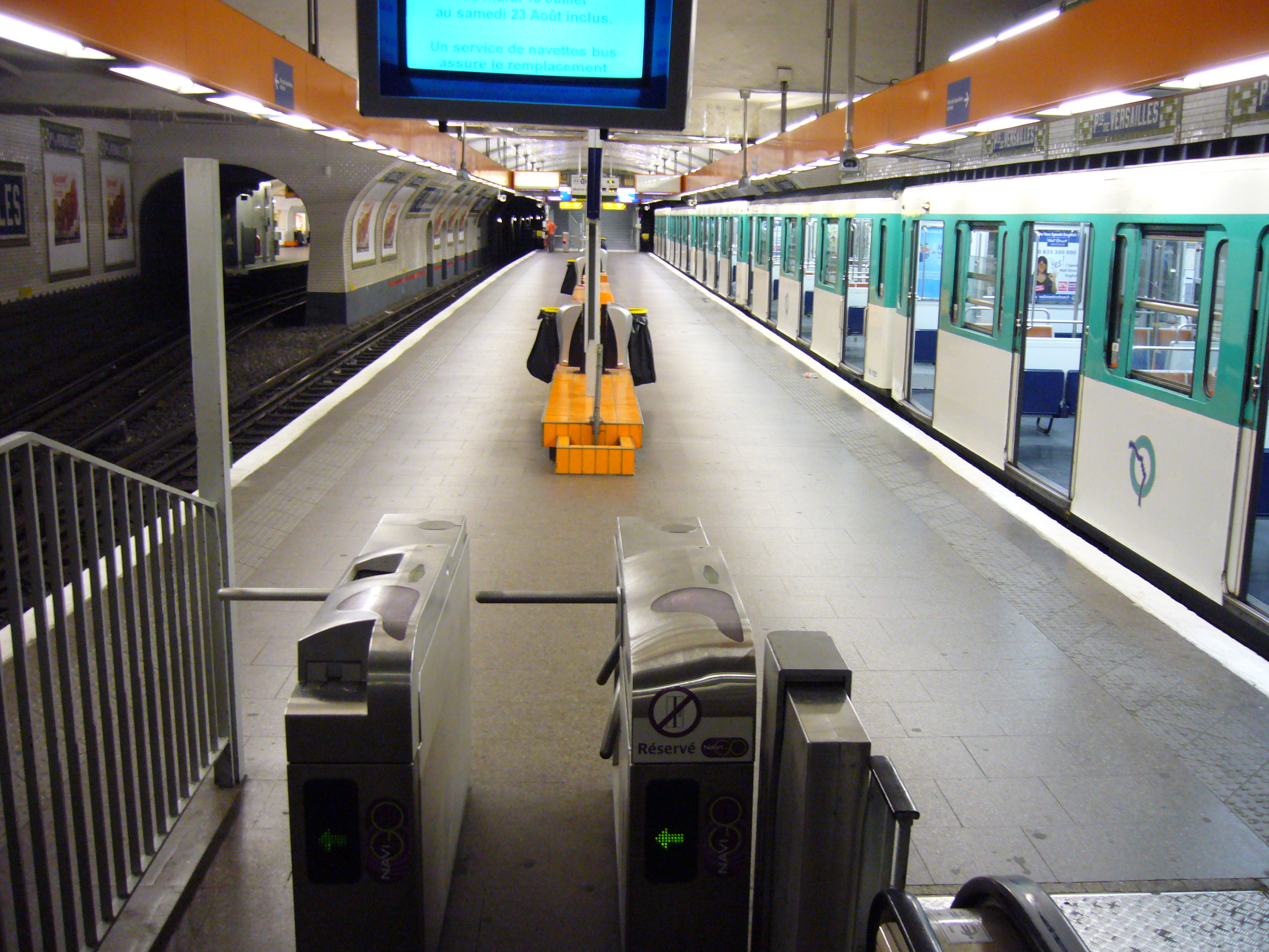 Station Porte de Versailles sur la ligne 12 du métro de Paris.